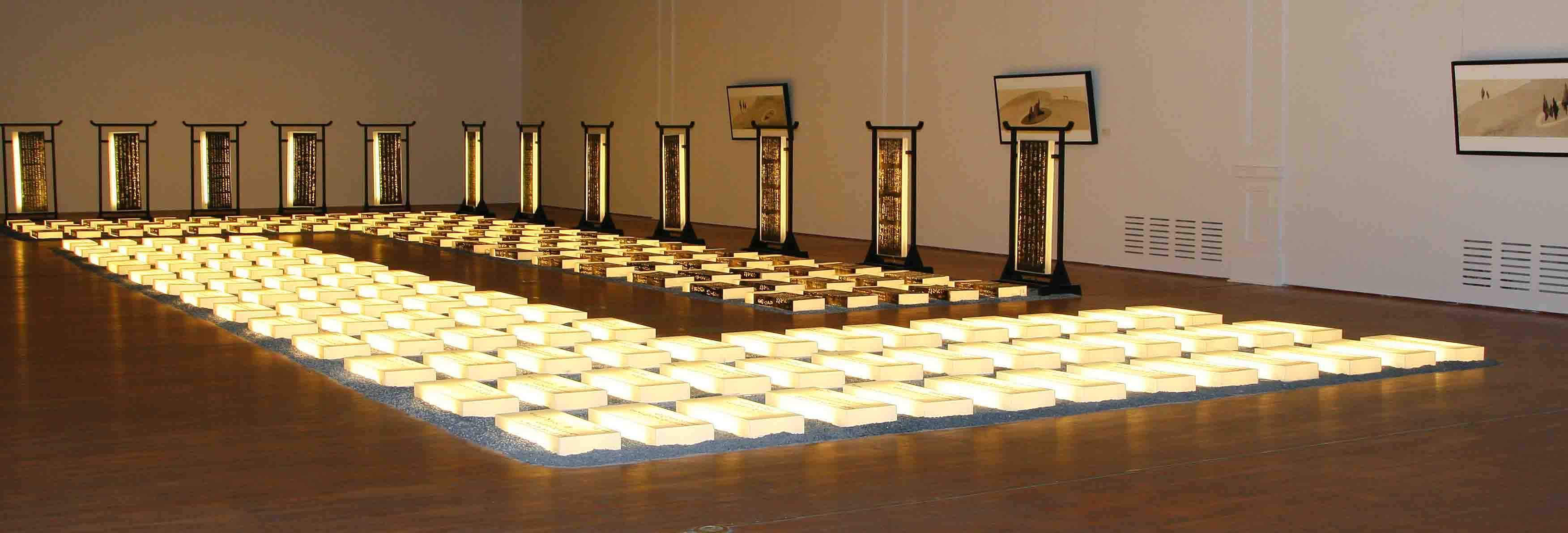 Black, white and in between de Li Chevalier